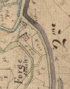 La Farga de Dalt de Sant Llorenç de Cerdans en el Cadastre napoleònic del 1812 (Arxius Departamentals dels Pirineus Orientals)